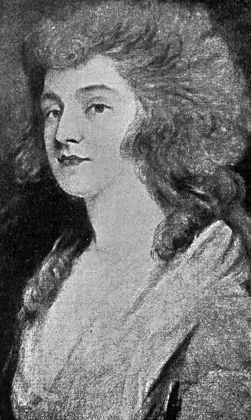 Maria Anne Fitzherbert